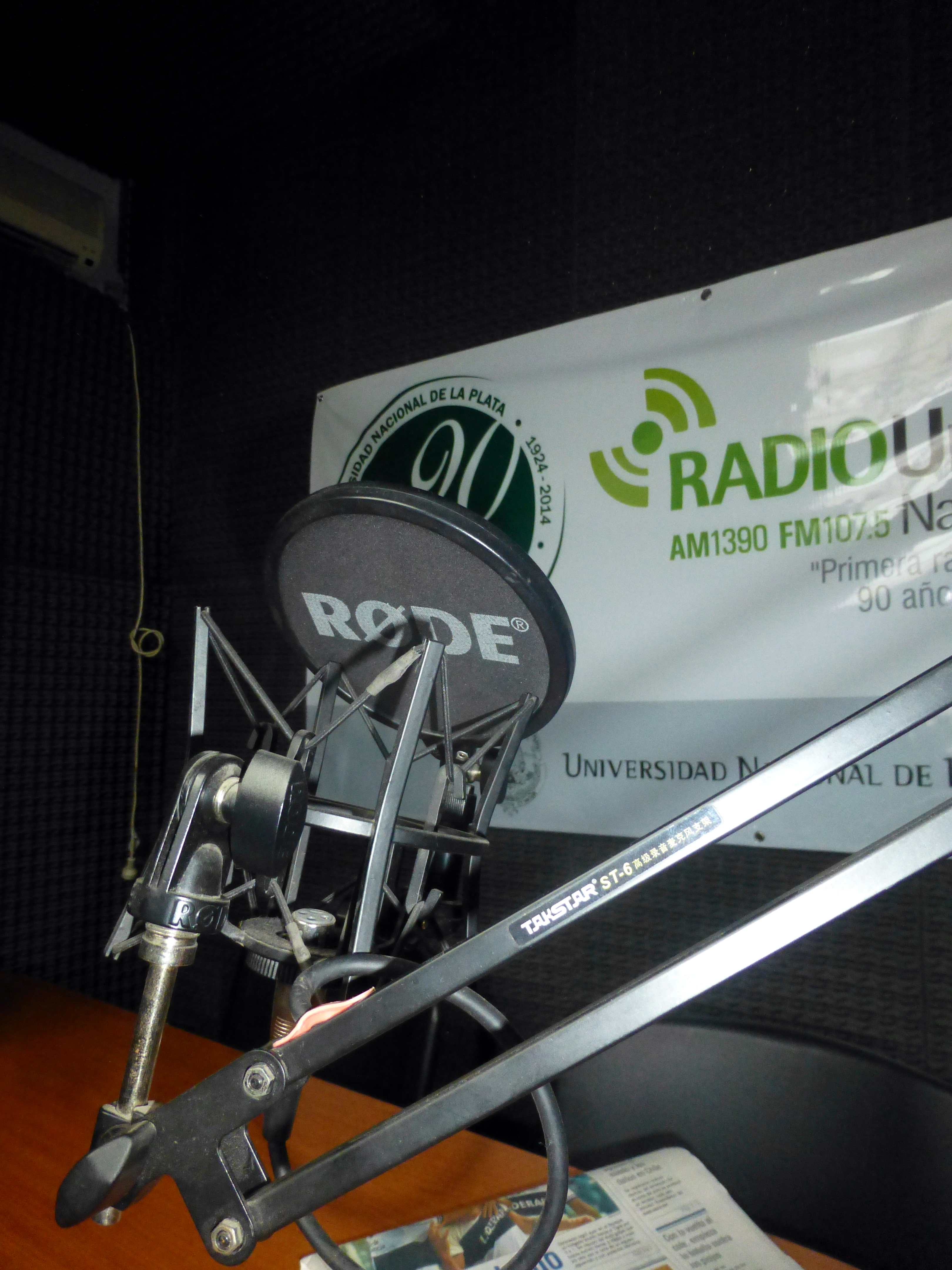 LR11 Radio Universidad Nacional de La Plata (Argentina)